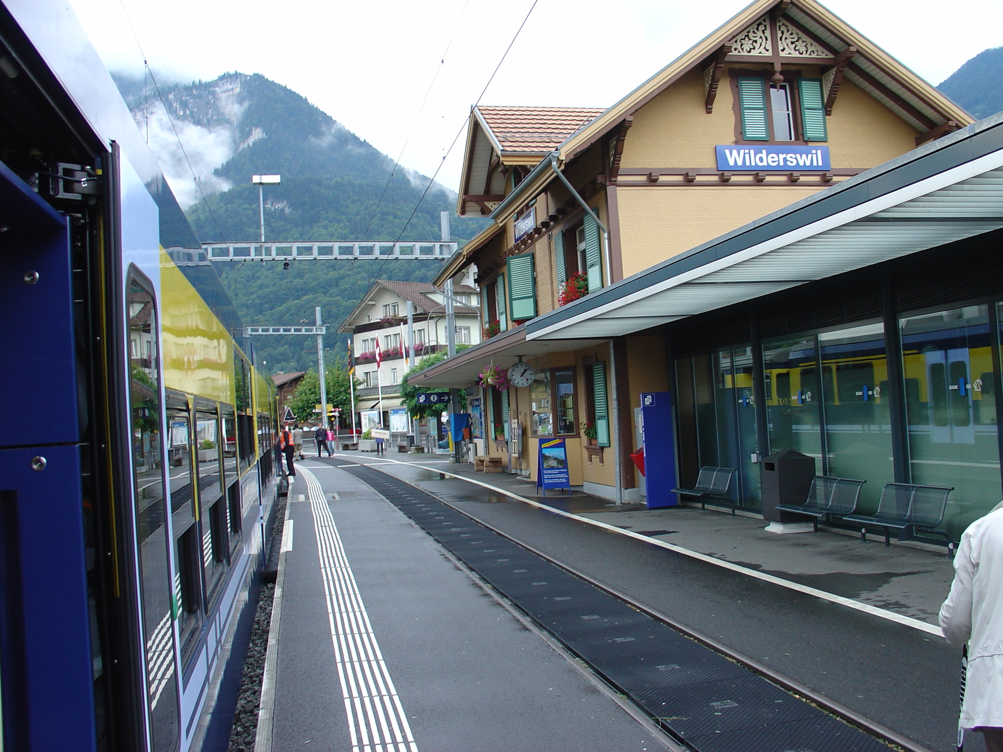 Berner Oberland-Bahn Wilderswil Station